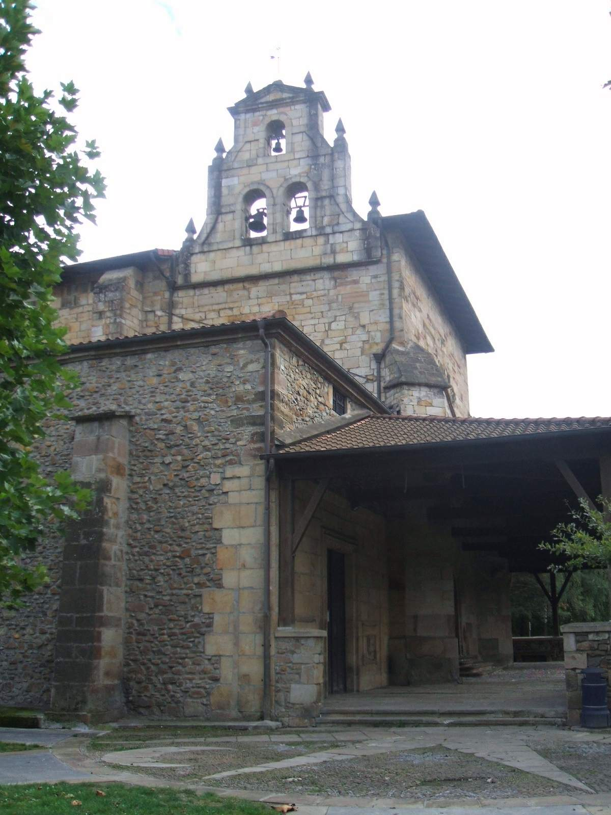 Iglesia de San Pedro de Tabira (Durango, Bizkaia)